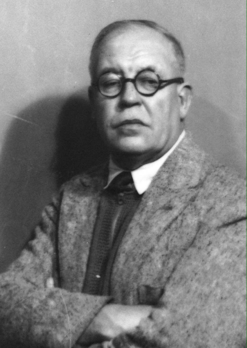 Portrait de Maurice Pillard Verneuil